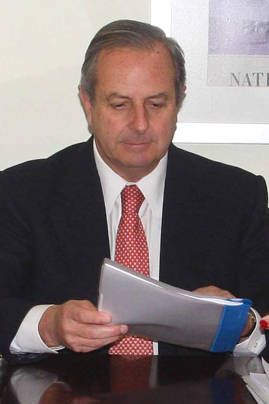 La secretaria de Estado presentó al Consejo de Defensa del Estado (CDE) —junto al subsecretario de Previsión Social, Augusto Iglesias; y el director del IPS, Juan Bennett— antecedentes sobre la acusación de una ex empleada de La Polar, quien señala que durante los años 2004 y 2005 la multitienda habría comprado una parte de la base de datos de los beneficiarios del ex INP (hoy IPS).